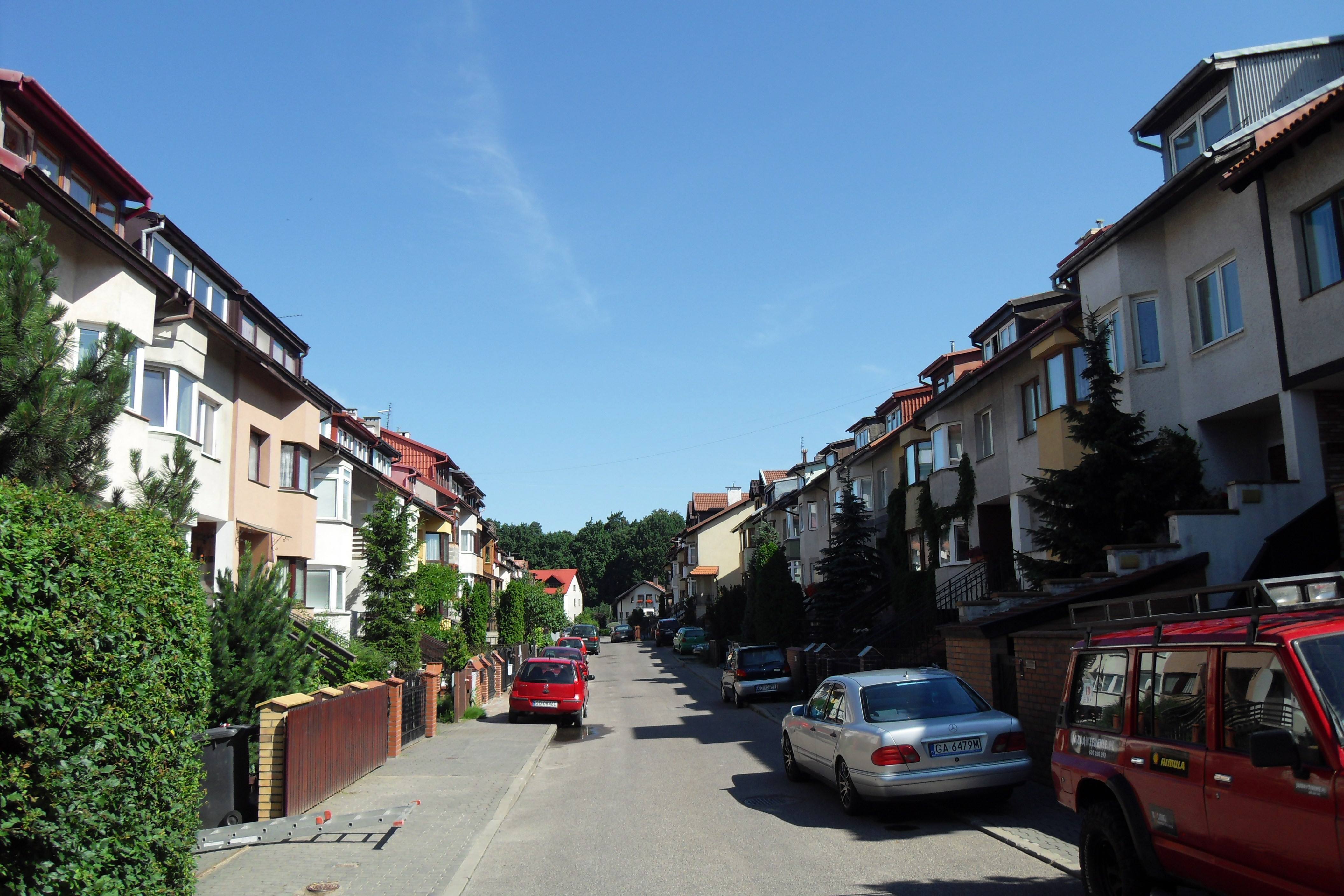 Gdańsk Złota Karczma, ul. Lutniowa.